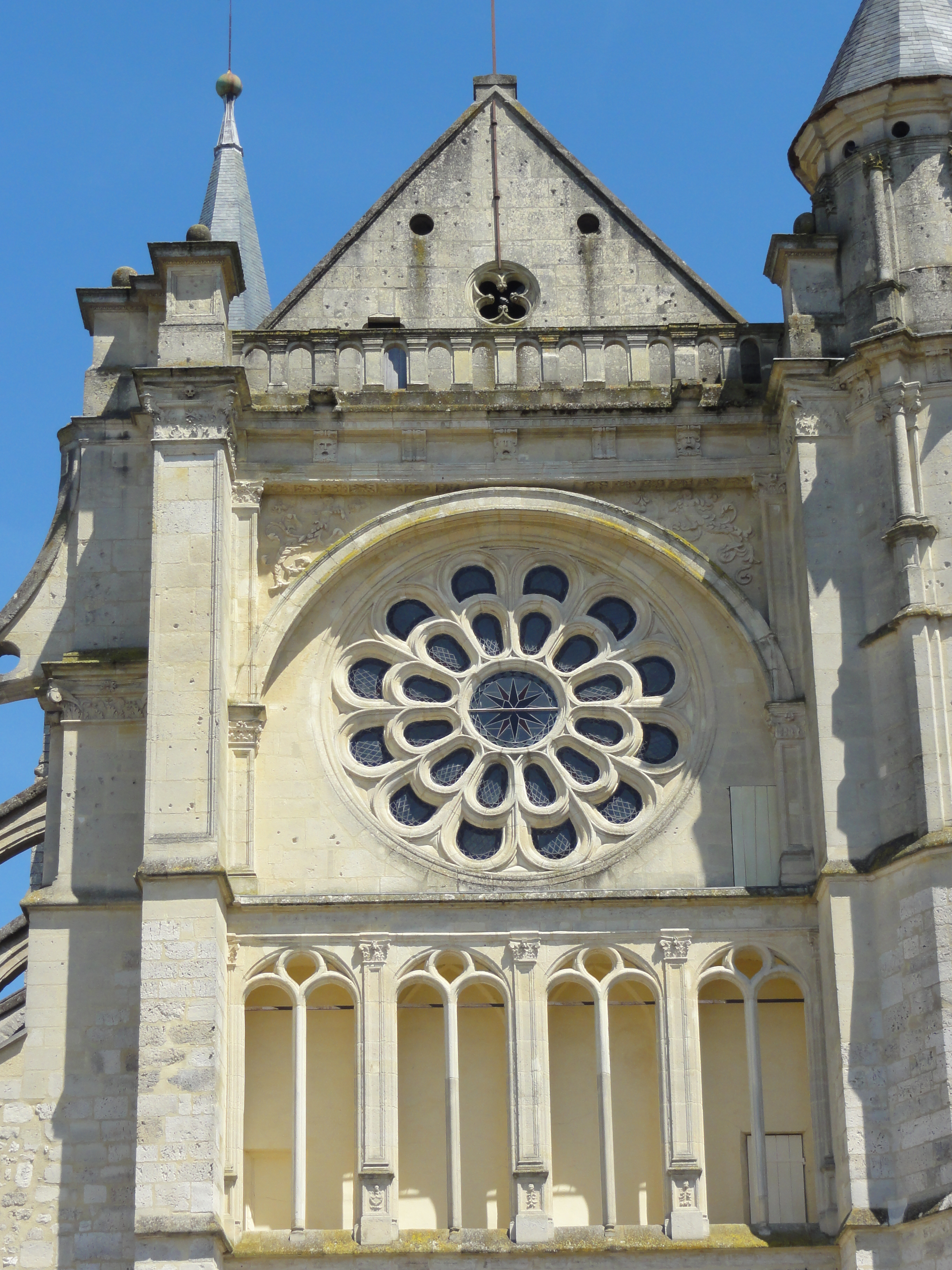 Façade occidentale, parties hautes.